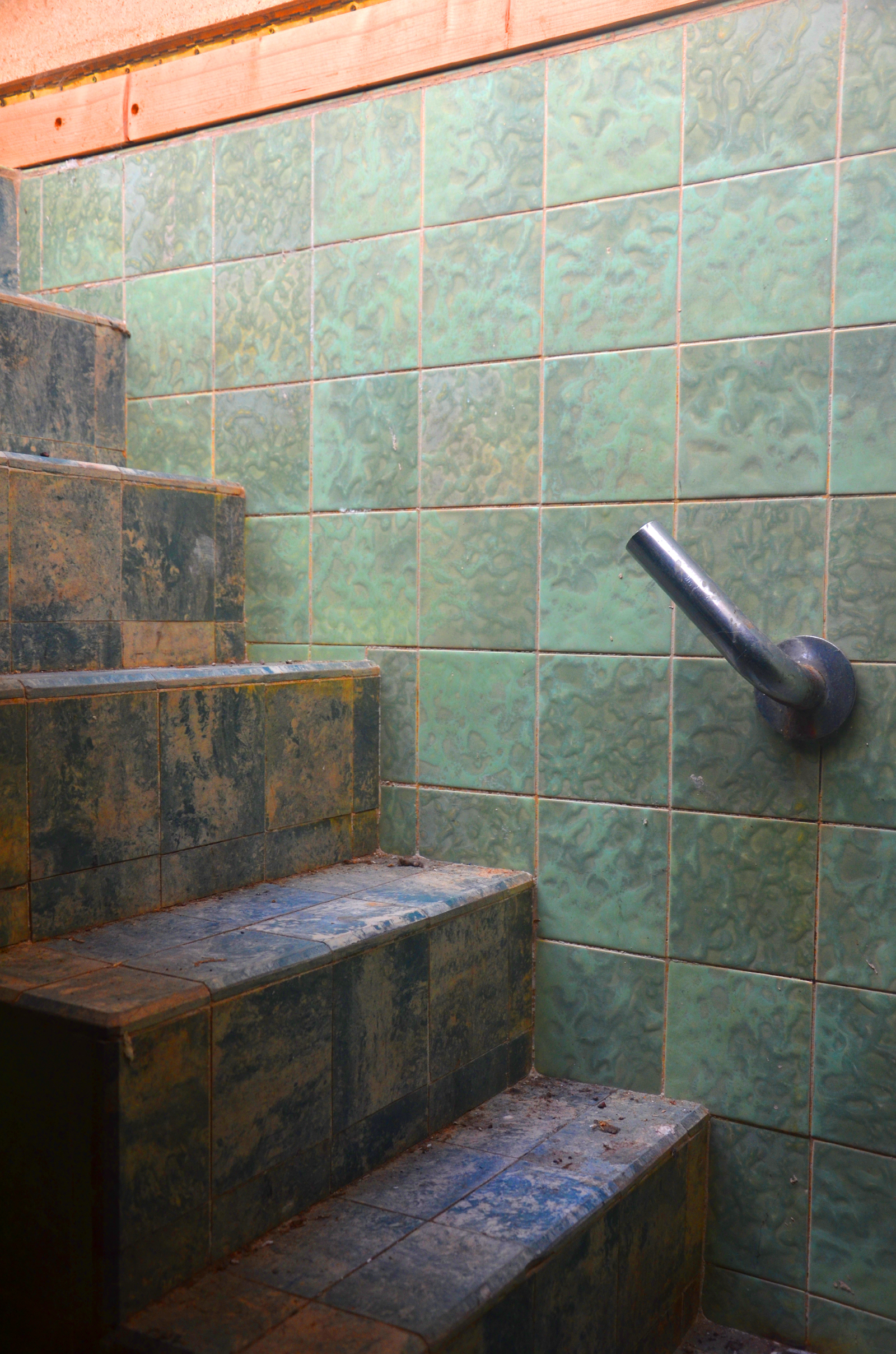 Noch erhalten: Die in blau und türkis gestalteten keramischen Kacheln am Treppenaufgang im ehemaligen Tauchbad der Nordstädter Badeanstalt (auch: Badeanstalt Wenger) in der Oberstraße 13 in der Nordstadt von Hannover ...